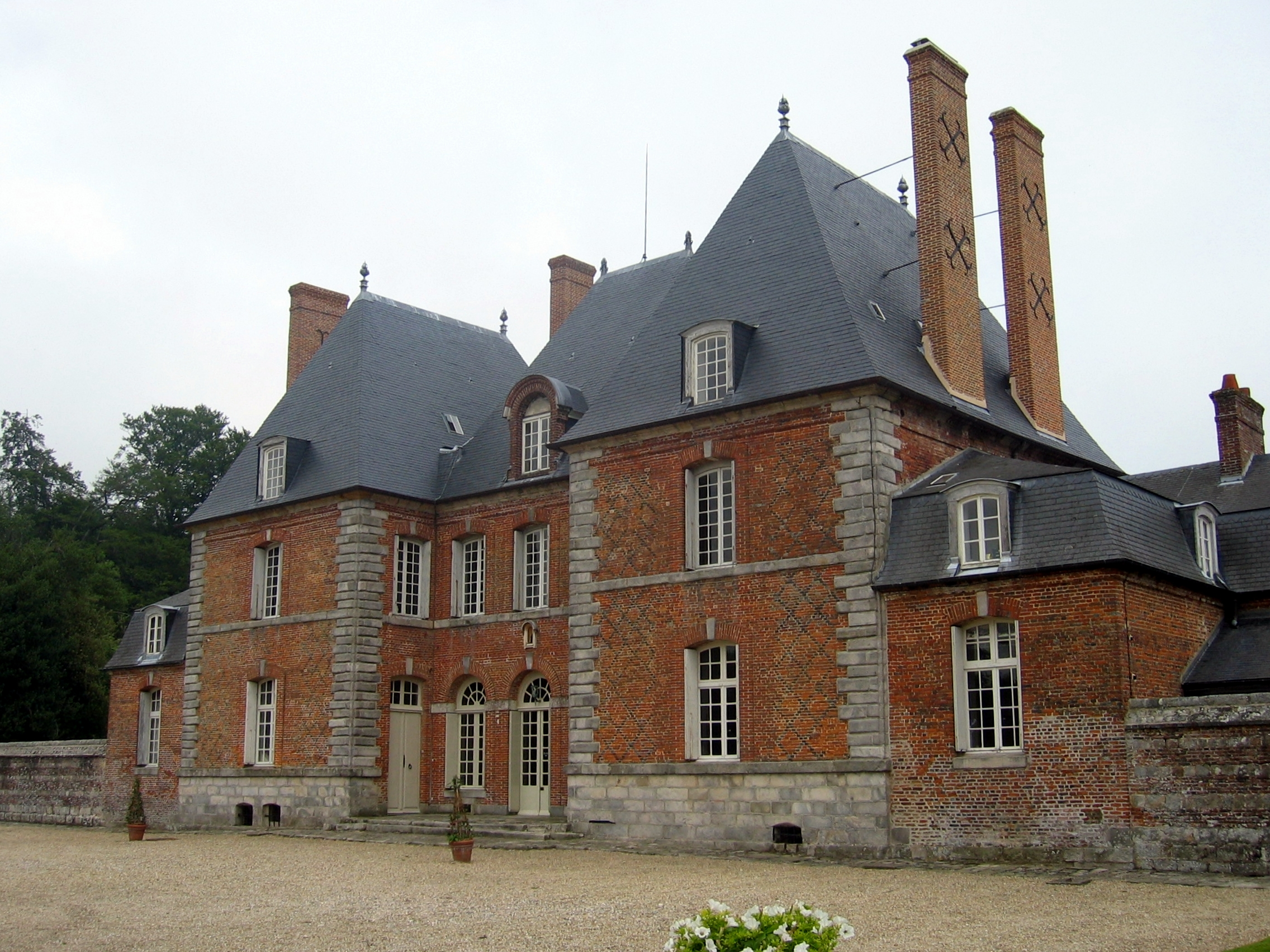 Château du Mesnil-Geoffroy (Classé) .